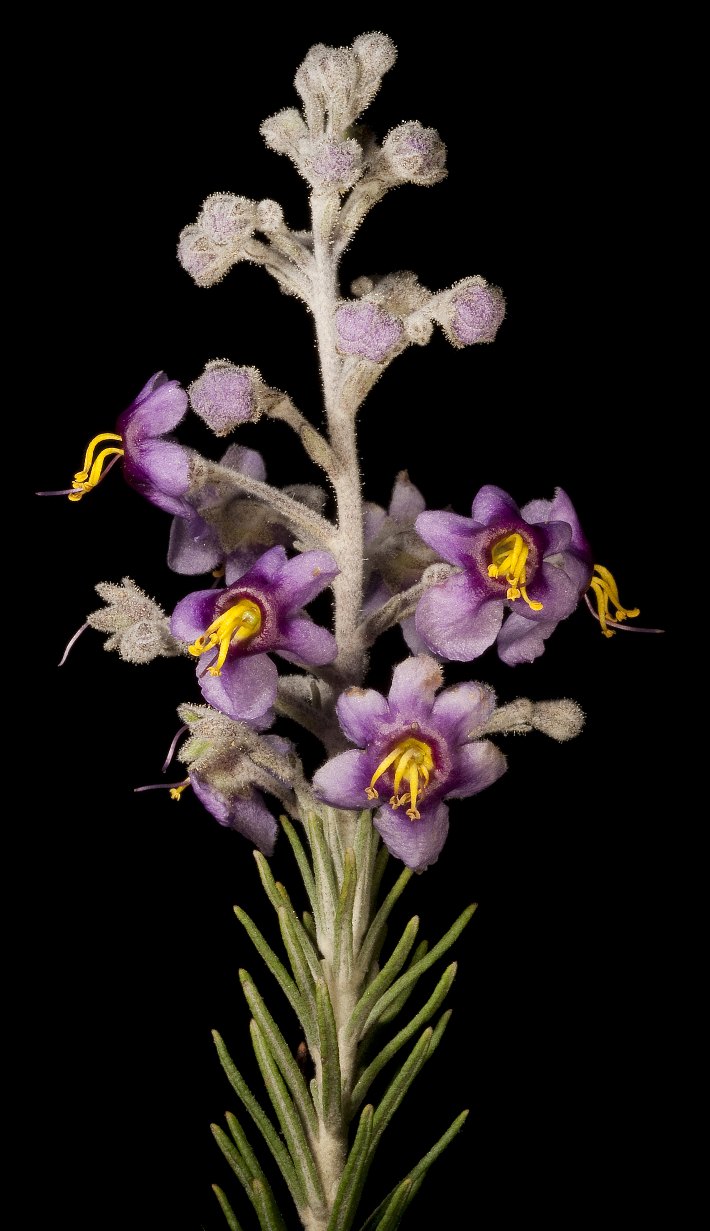 Brachysola coerulea con una corola surnumeraria (abajo, derecha).